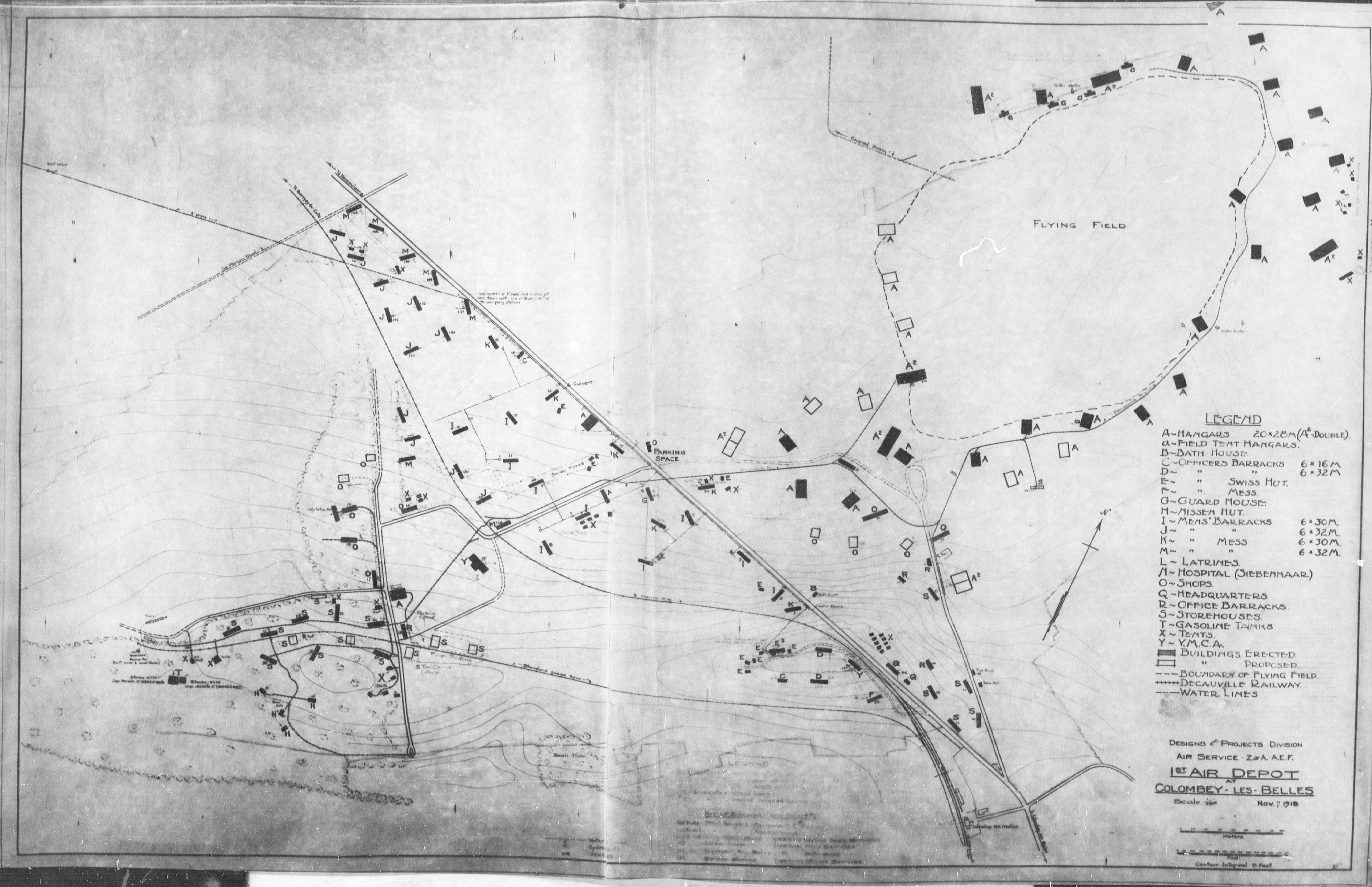 Colombey-les-Belles Aerodrome - 1st AD Map